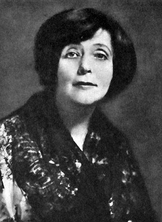 Frida Uhl